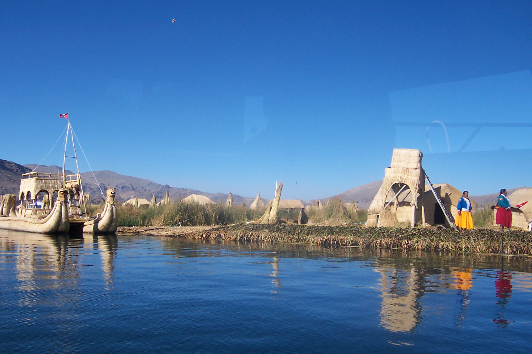 Isla flotante de los Uros en el Lago Titicaca. Autor: Alfredobi Fecha: Agosto 2006